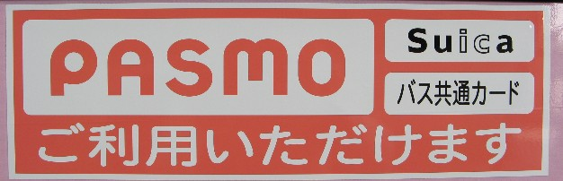 この画像は登録者Tokyodesert自身が撮影したものである。